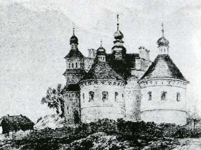 Sutkowce – obronna cerkiew Pokrowska z około 1467, zbudowana na planie krzyża greckiego o półkolistym zakończeniu ramion, z których każde dźwiga ostrosłupowy dach; posiada w zwieńczeniu wysunięty gzyms arkadowy mieszczący strzelnice.